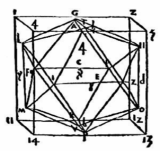 Illustration du livre prospectiva pingendi de Piero della Francesca; Une illustration d'une perspective d'un traité mathématico-artistique sur le sujet